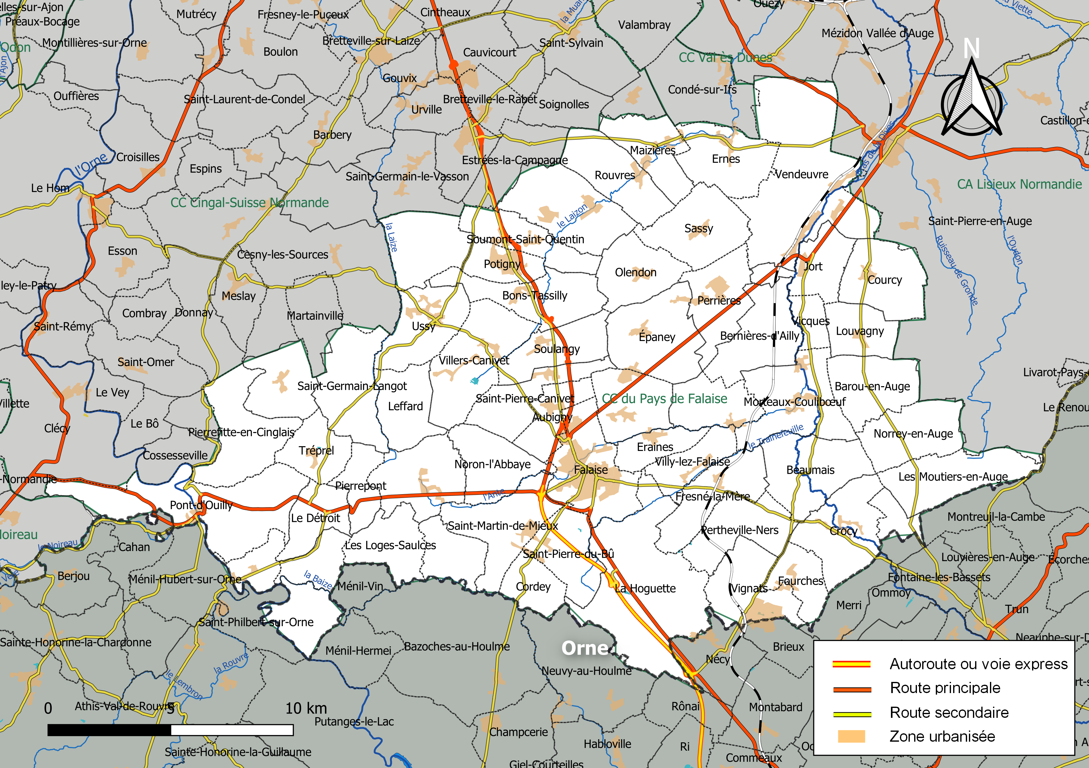 Carte géographique de la Communauté de communes du pays de Falaise, département du Calvados, France. Composition au 1er janvier 2019.